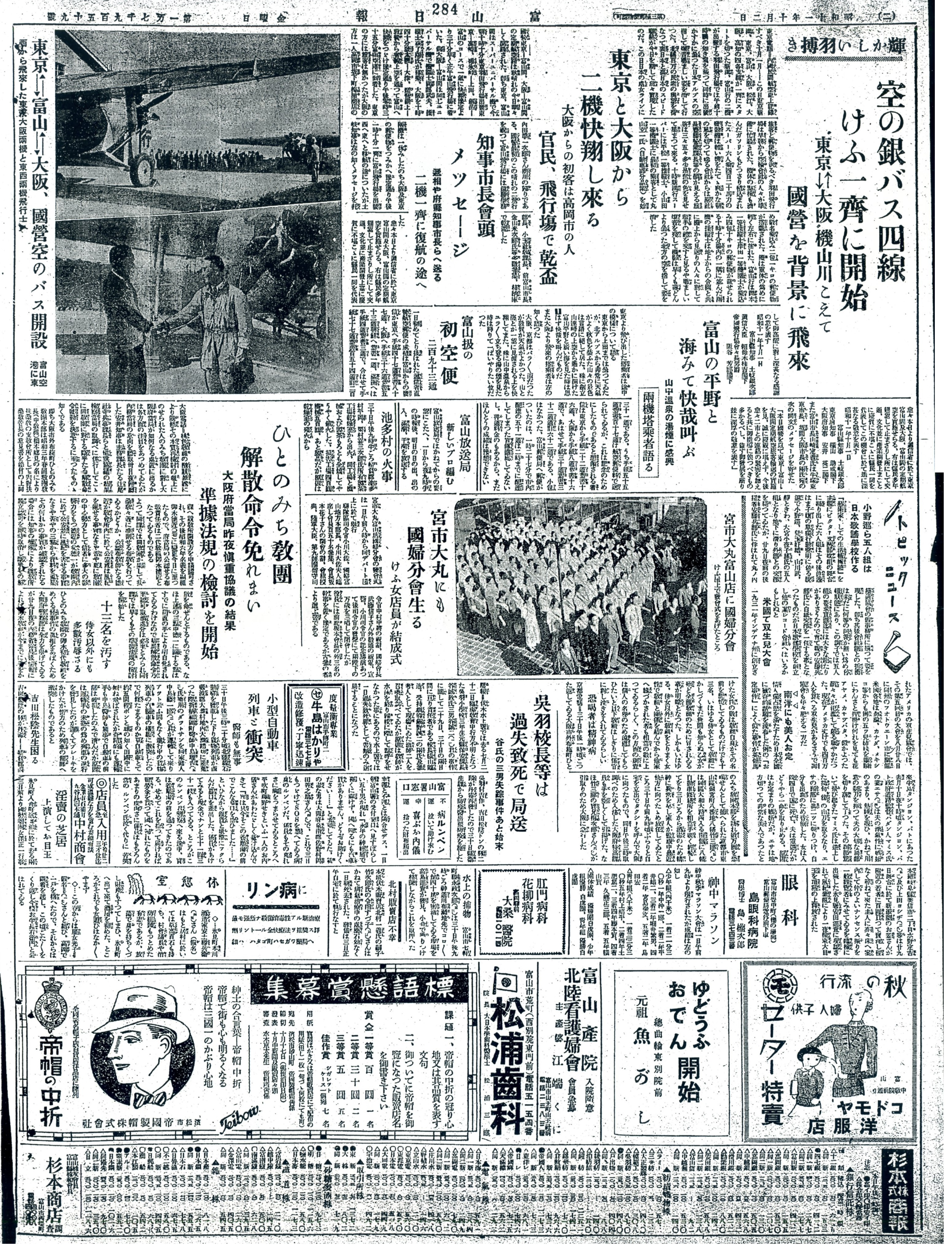 輝かしい羽搏き 空の銀バス四線けふ一斉に開始 ”東京⇄大阪”機山川こえて国営を背景に飛来